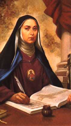 Maria Celeste Crostarosa, from a devotional print